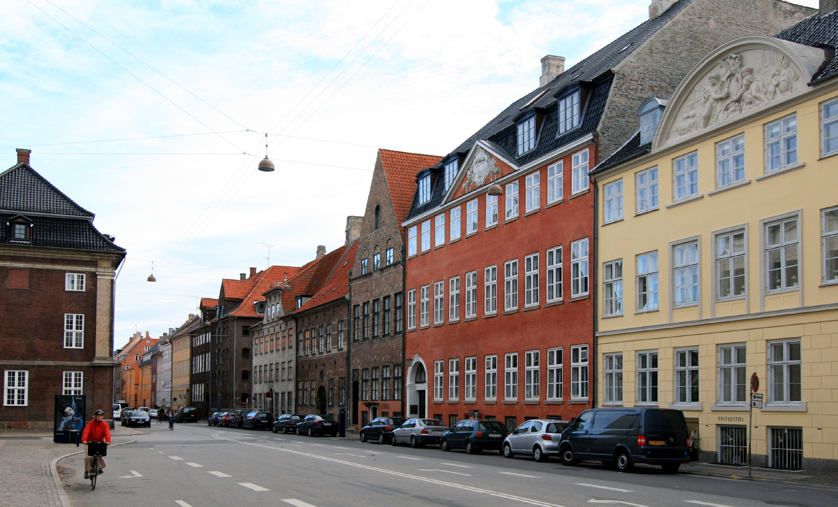 Strandgade, København.